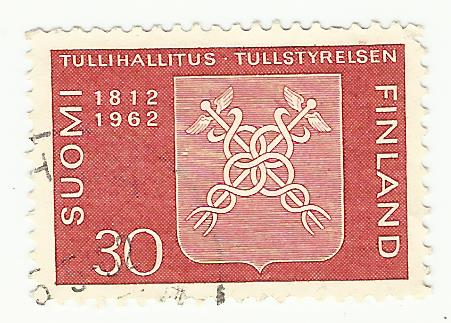 Tullihallitus 150 vuotta -juhlapostimerkki